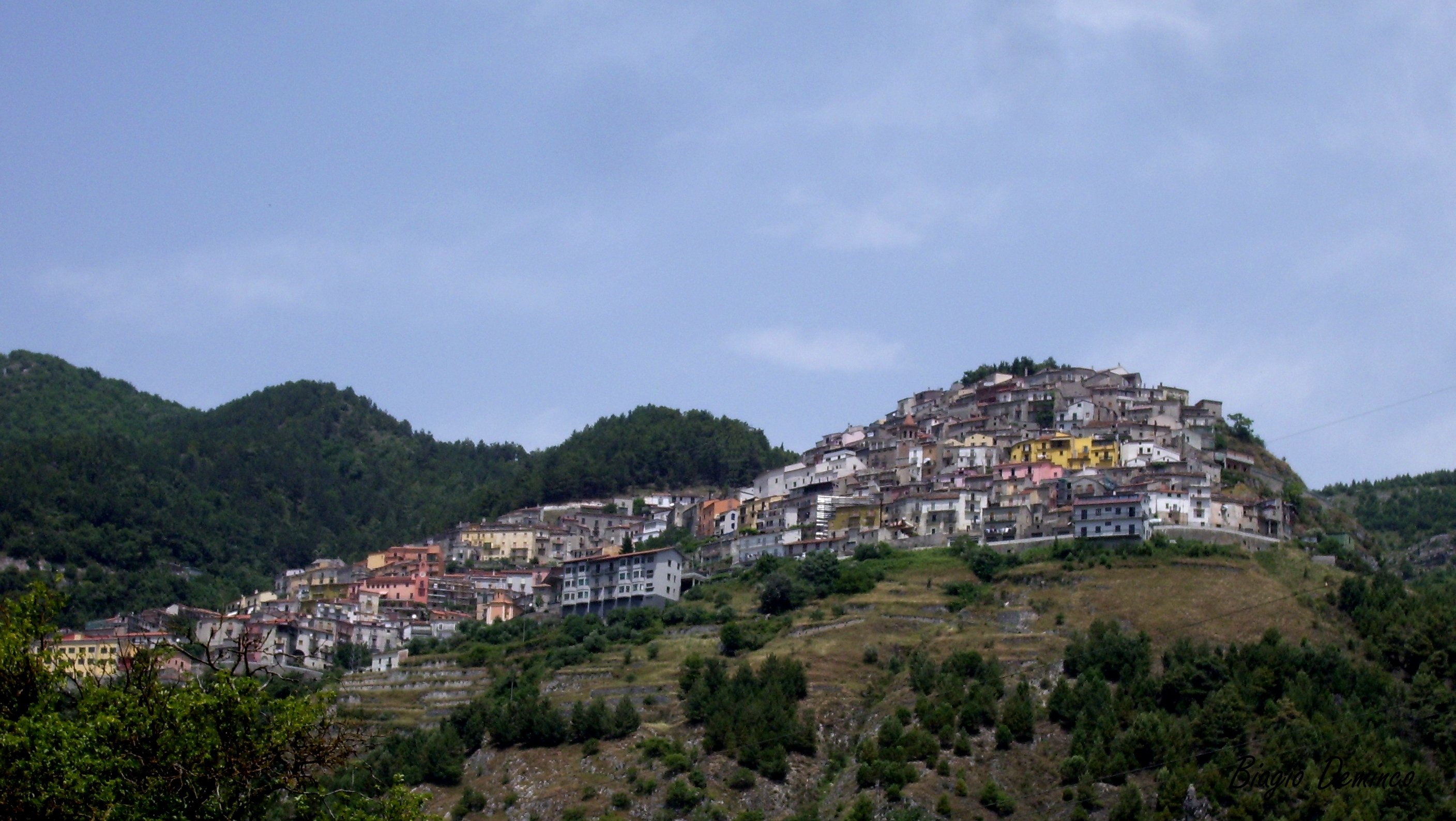 Panoramica di Castelluccio Superiore